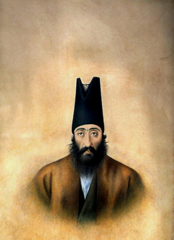 Мирза Юсеф Мostofi-Ol-Mamalek премьер_министр (1859-70)